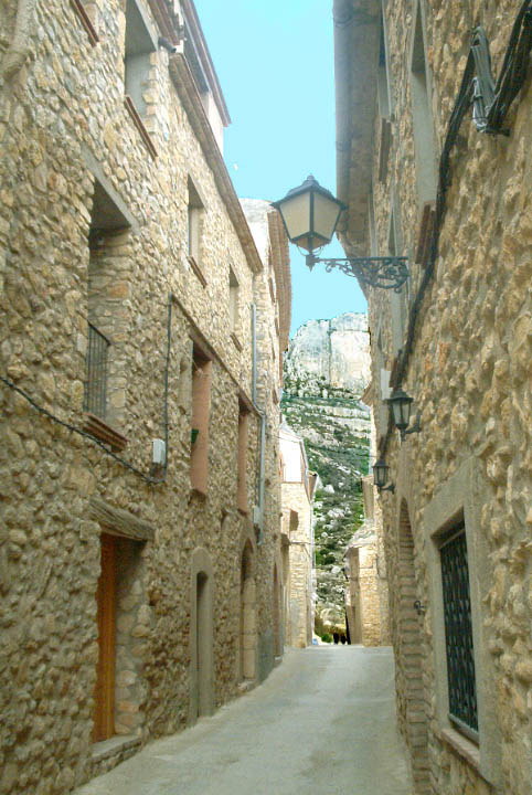 Carrer de la Morera de Montsant